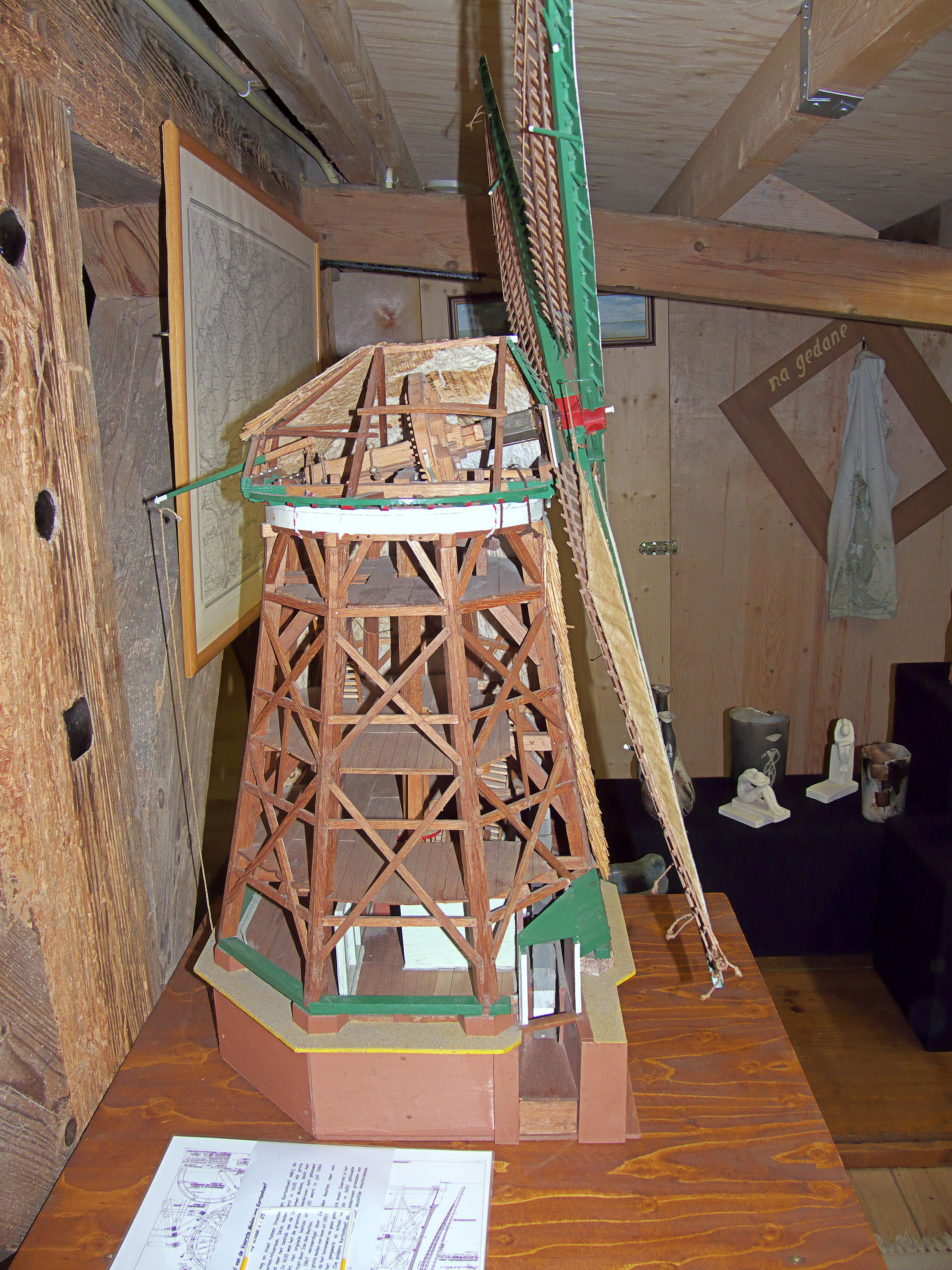 Achtkante poldermolen in het molenmuseum van molen De Liefde in Streefkerk